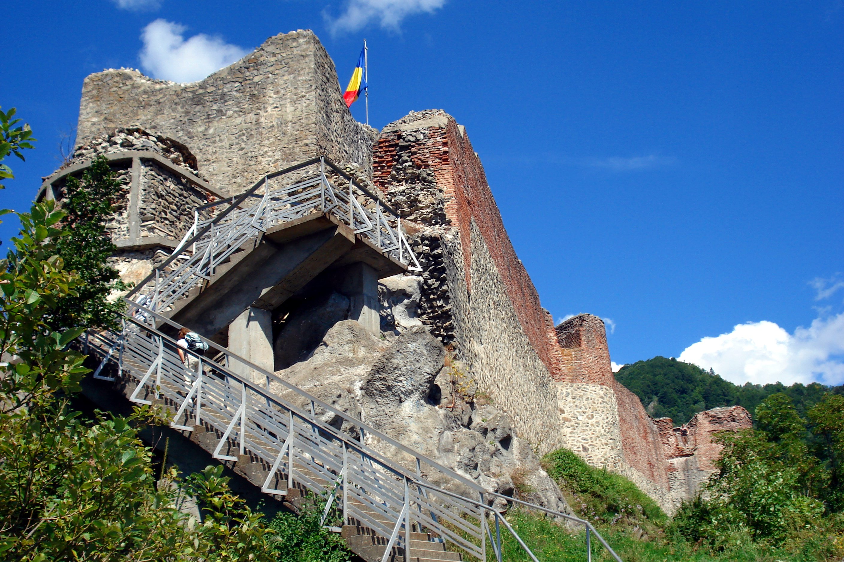 Château de Poenari